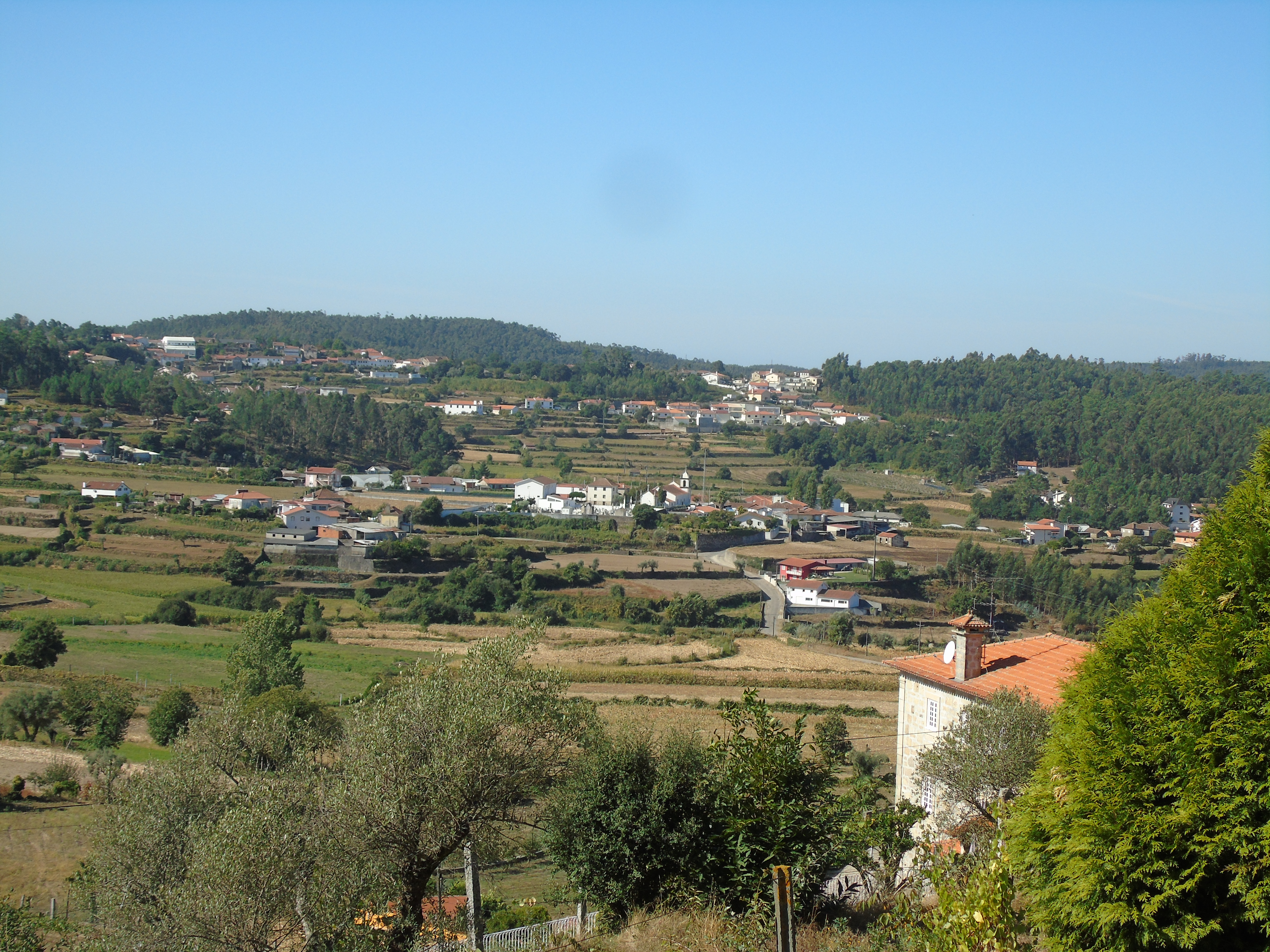 Vista panorâmica da Quinta do Castelo de Fermedo, onde se insere a Casa do Castelo de Fermedo